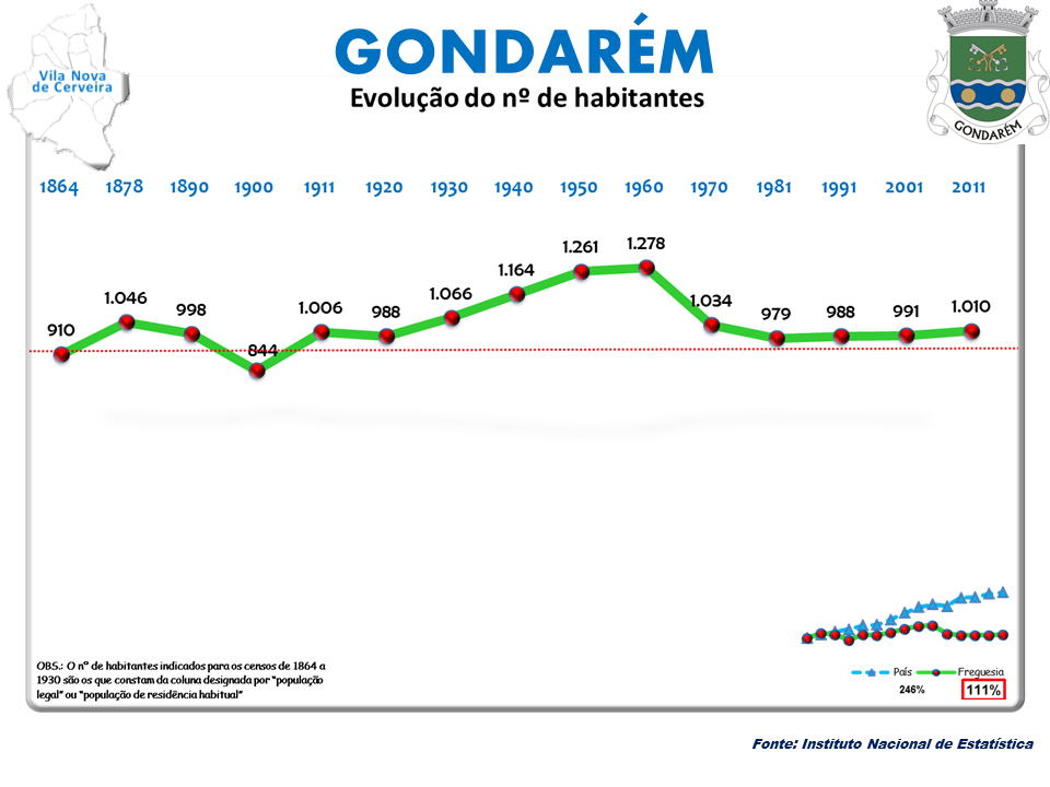 Censos 1864/2011